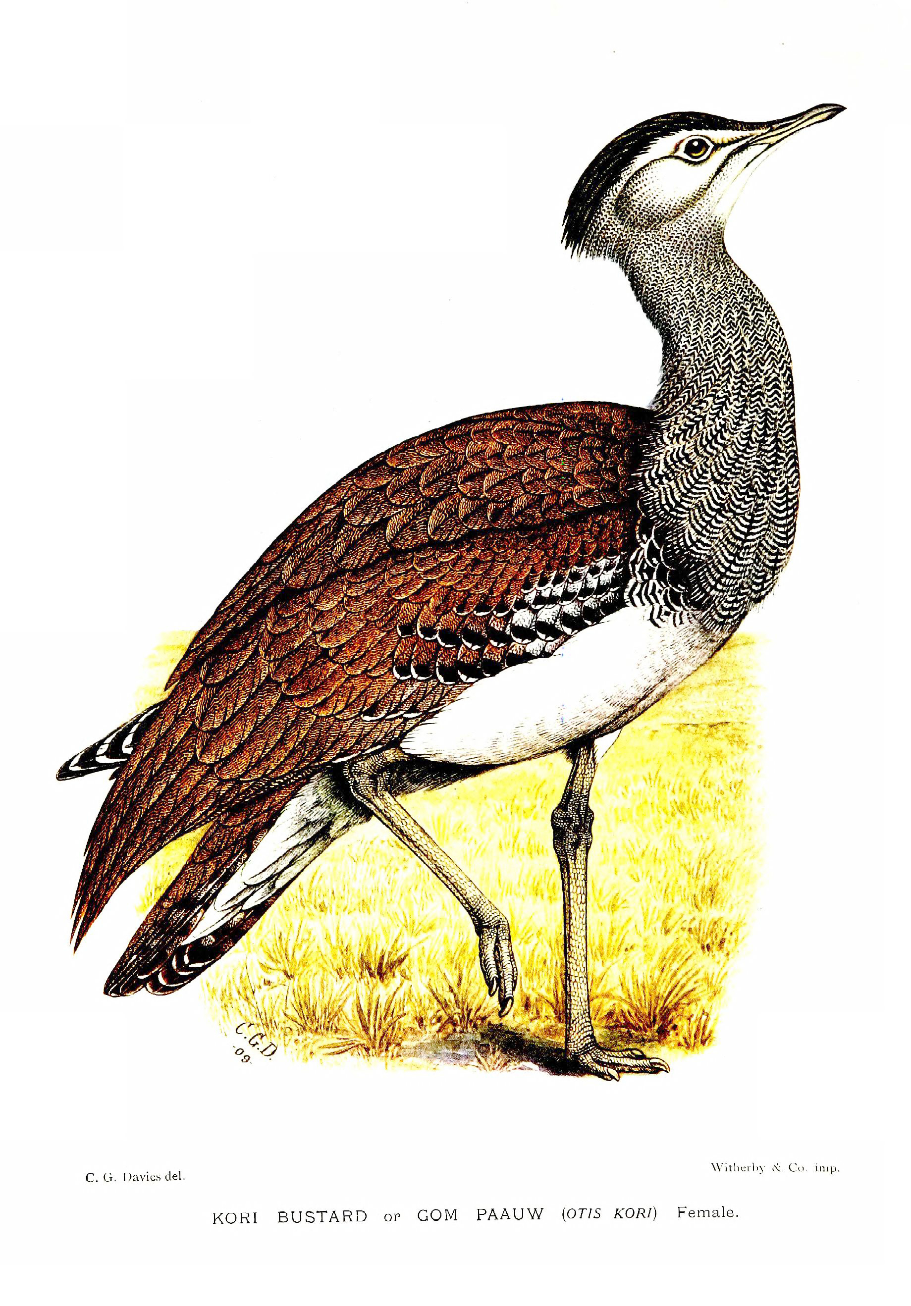 Kori Bustard